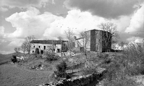 Ermita de San Miguel de Aritzeta